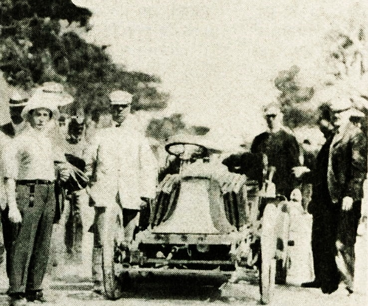 Joe Tracy, deuxième des 100 miles de Cuba 1905, sur Renault 40 hp - La Vie au Grand Air du 9 mars 1905, p.193